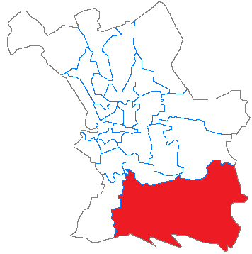 Situation du canton dans la ville de Marseille